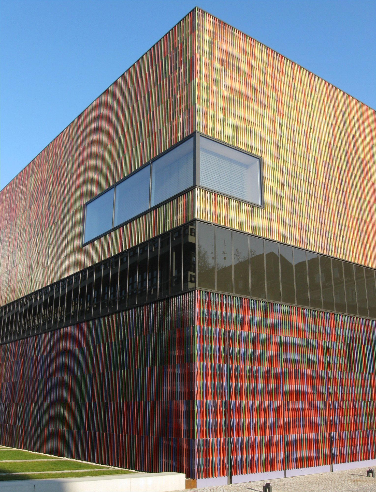 Museum Brandhorst, Muenchen, kurz vor der Eröffnung